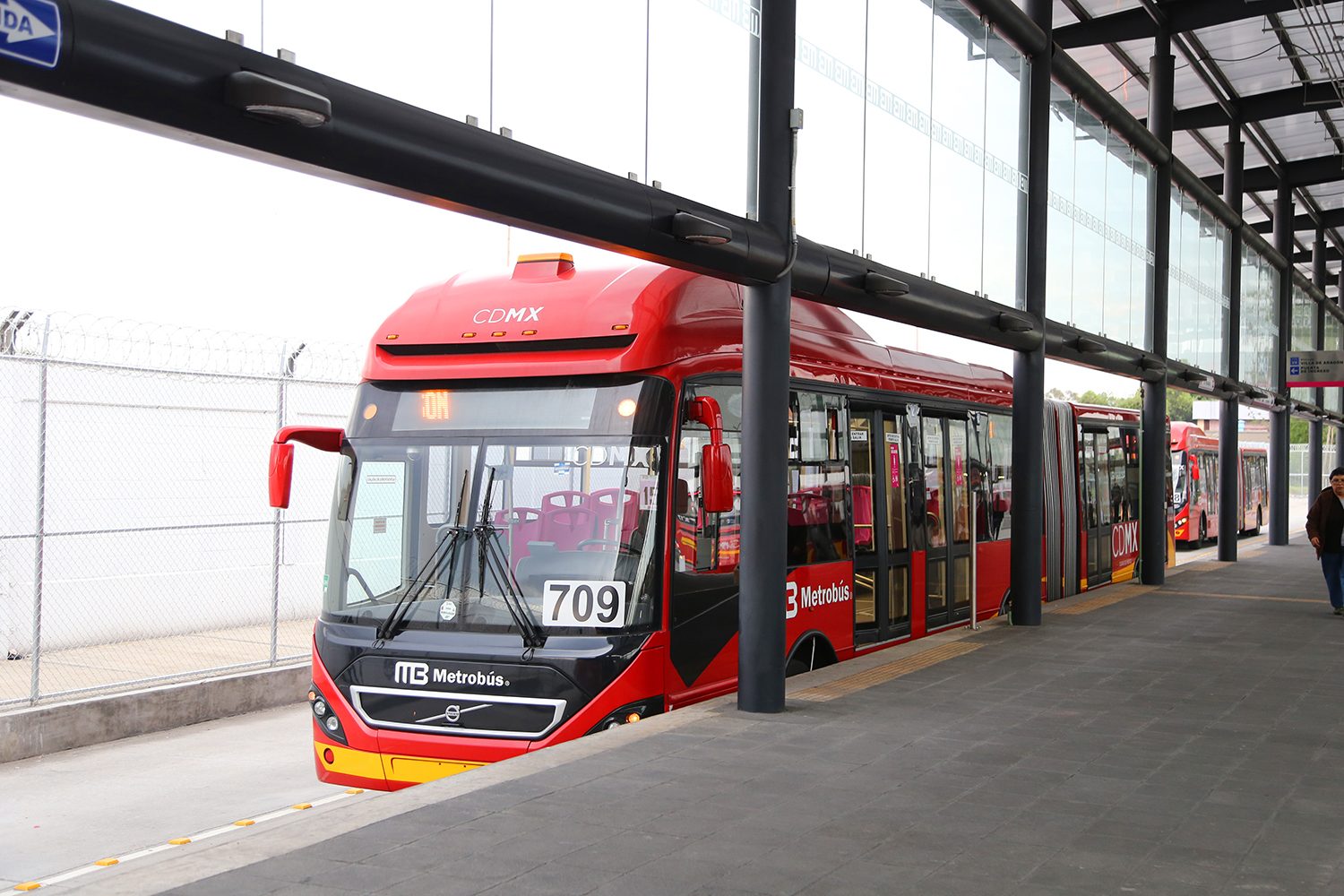 Transporte público de la Ciudad de México. Autobuses, metrobús, metro